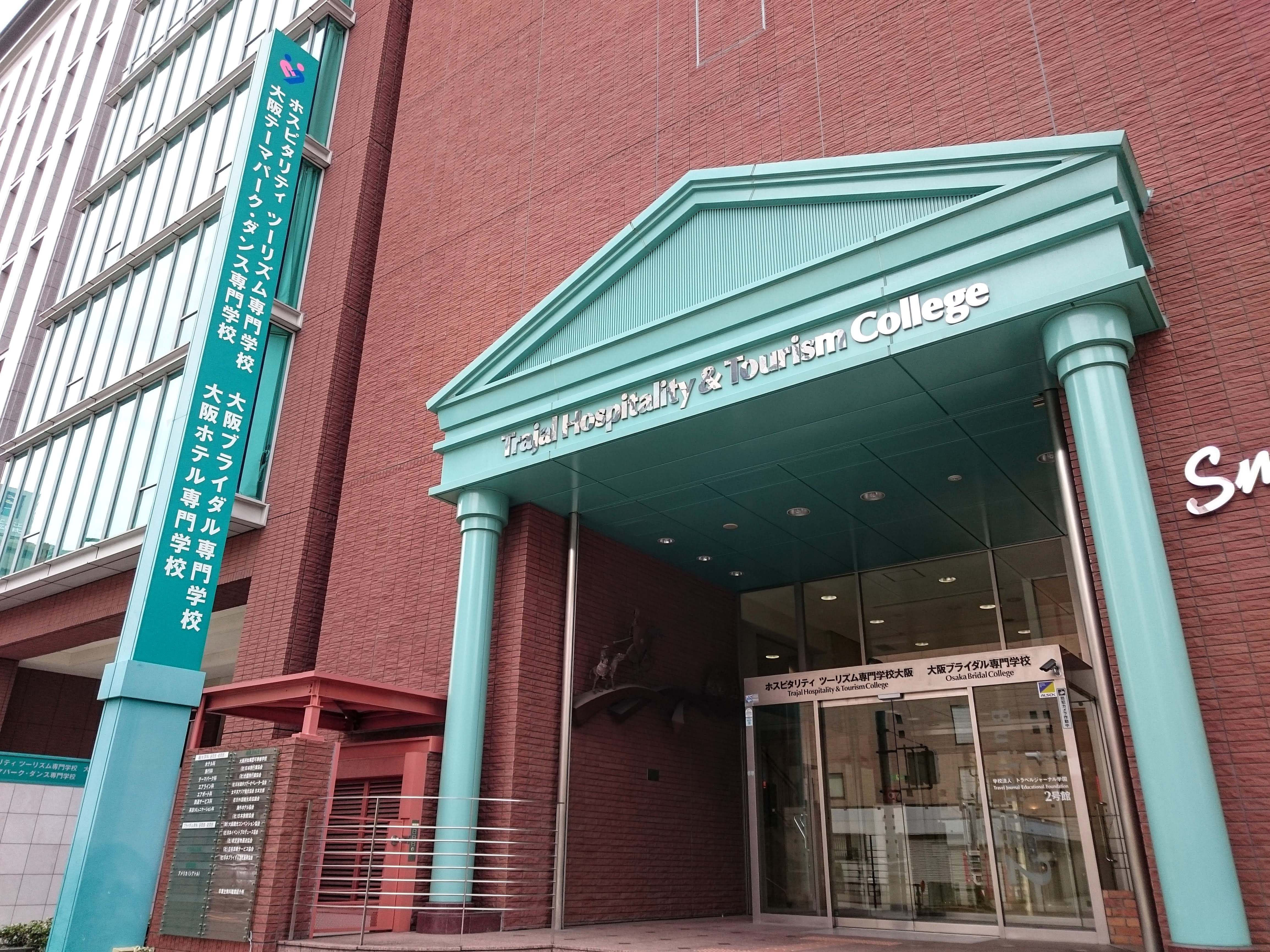 ホスピタリティツーリズム専門学校大阪の入口